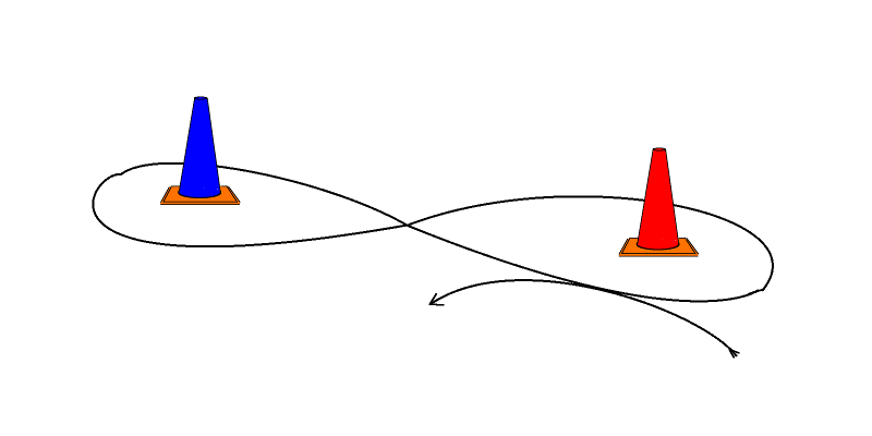 Jedna z figur które mogą wystąpić na torze w zawodach motocyklowych Gymkhana.